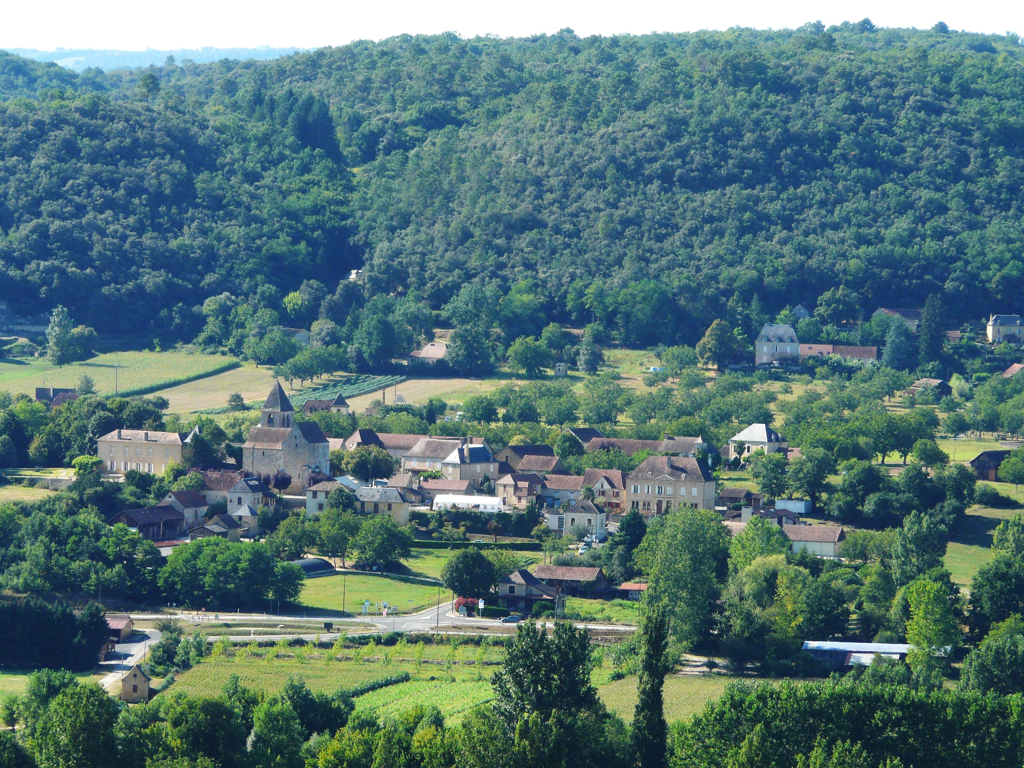 Le bourg de Calviac-en-Périgord vu depuis le château de Fénelon, Dordogne, France.